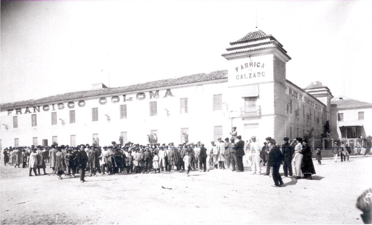 Fabrica Hijos de Francisco Coloma. Almansa. 1910. Calzados Coloma